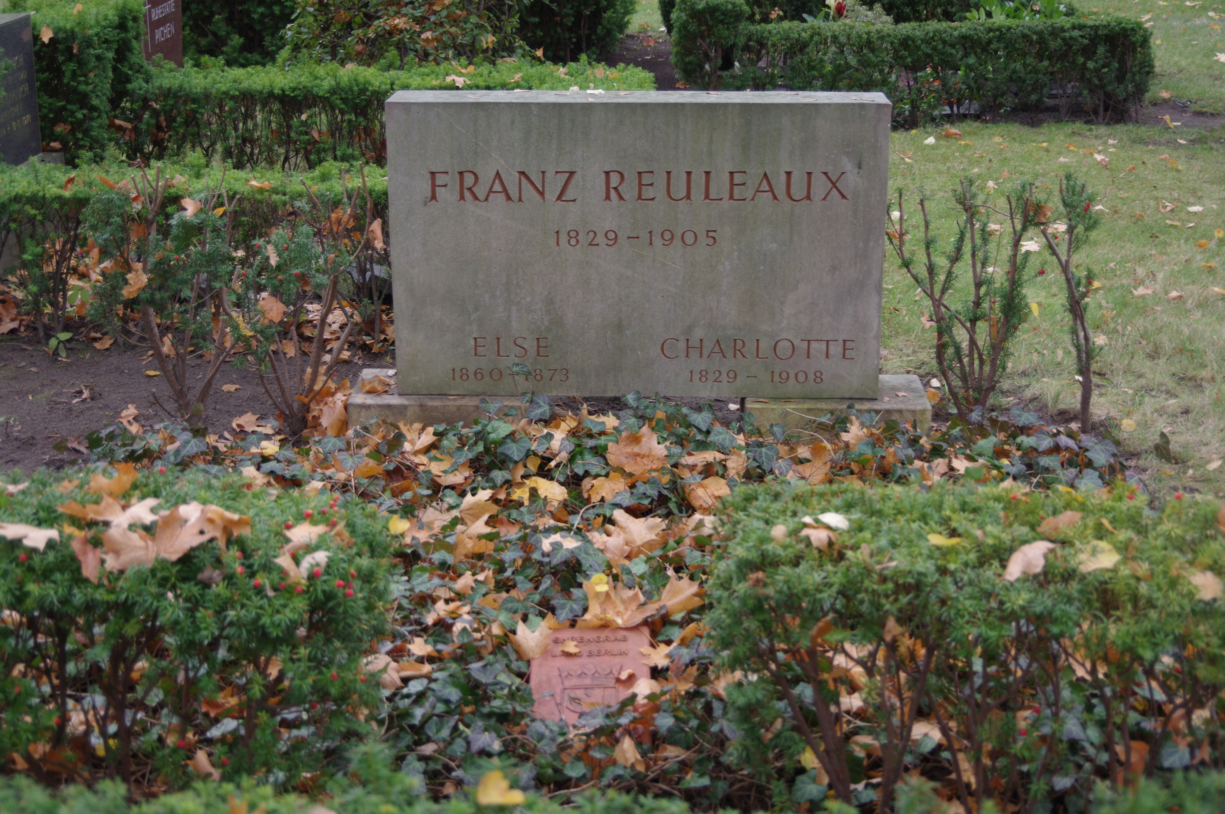 Der Alter Zwölf-Apostel-Kirchhof in Berlin-Schöneberg. Der Friedhof ist denkmalgeschützt.